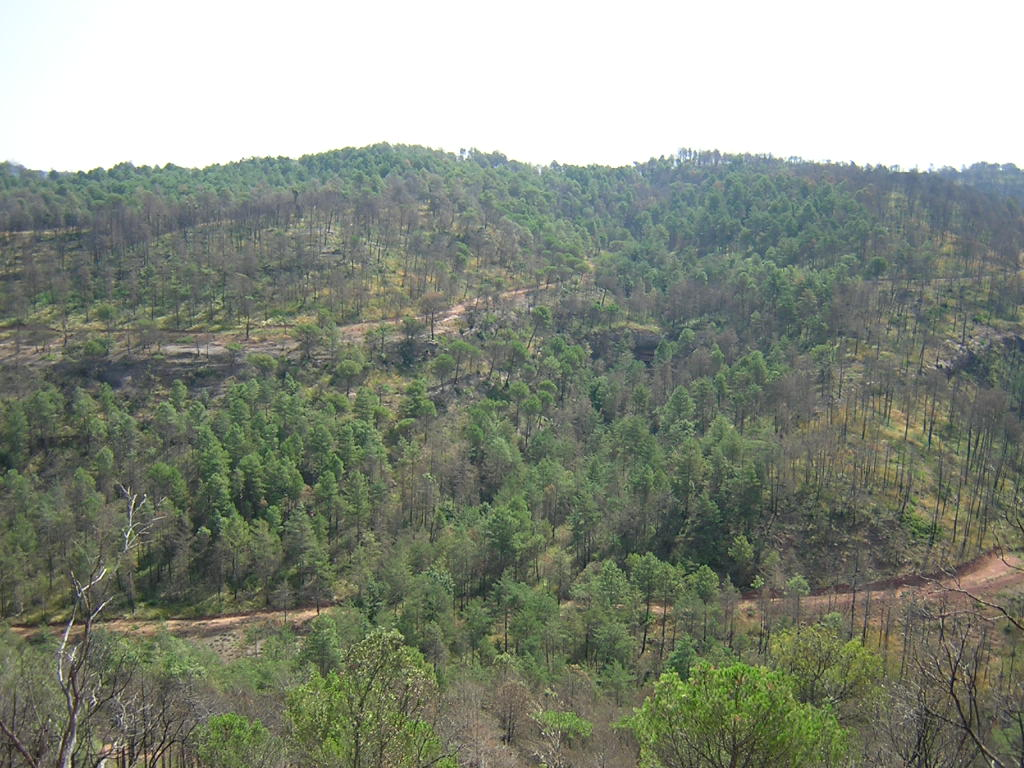 Serrat de l'Otzetó (Monistrol de Calders, Moianès)